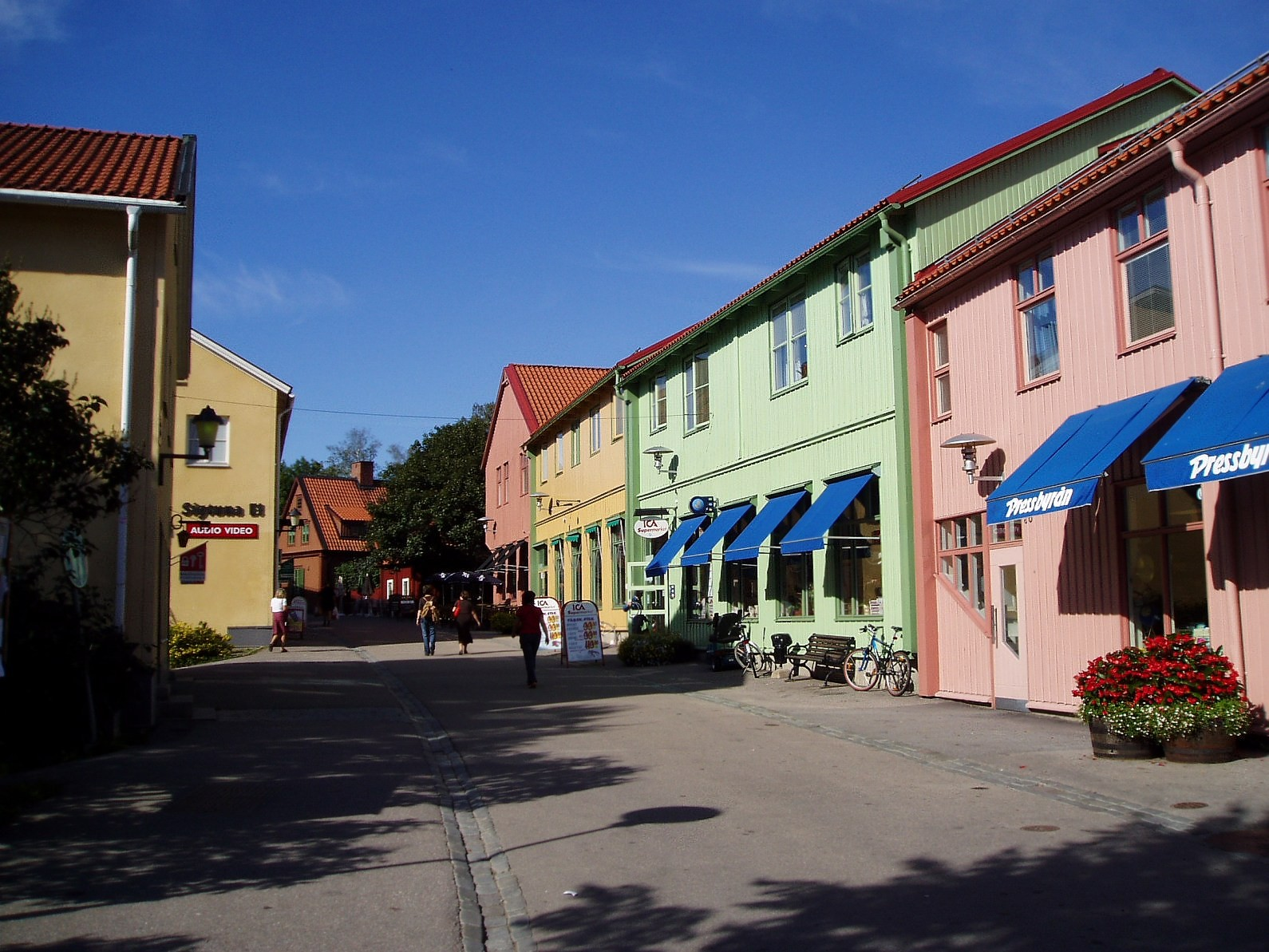 Storagatan, Sigtuna.